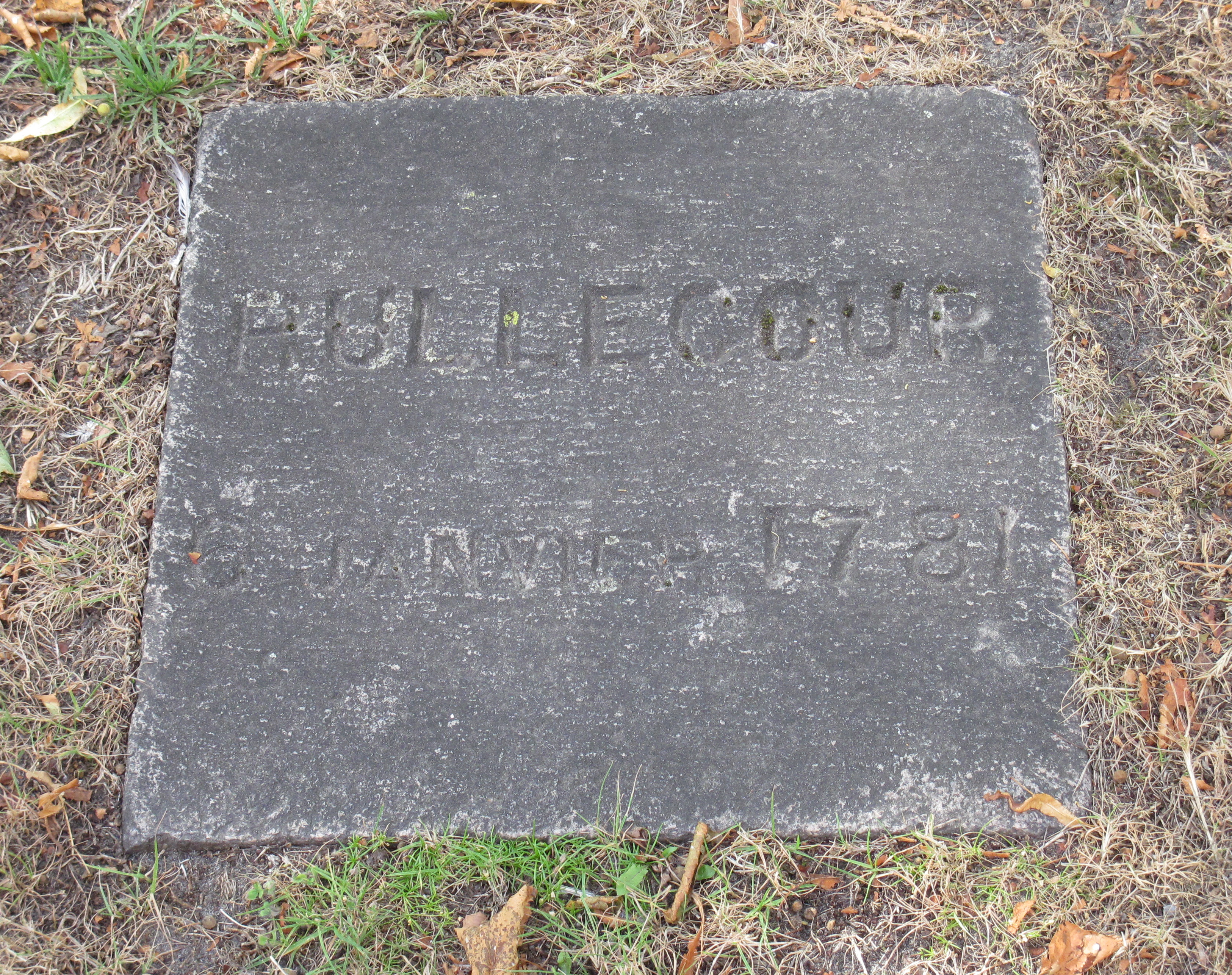 Nrf: Baron d'Rullecourt, pliaque à l'églyise dé Saint Hélyi, Jèrri